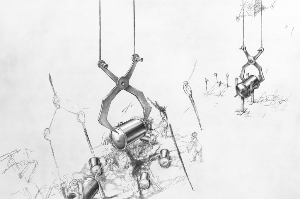 Uwe Ernst: Die Dekadenz (der Verfall) (2009)